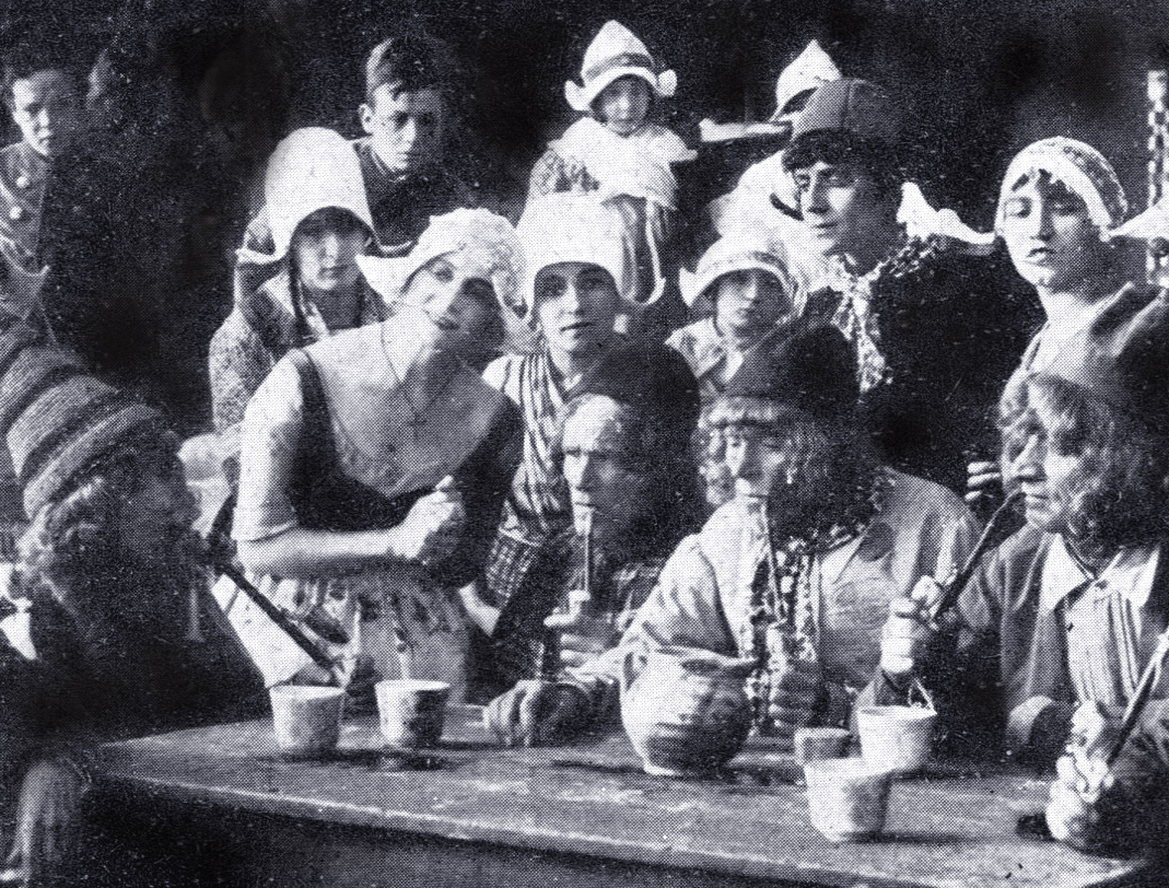 Foto di scena de I due zoccoletti regia di Enrico Roma, 1919 - Prod "Tespi Film", Roma